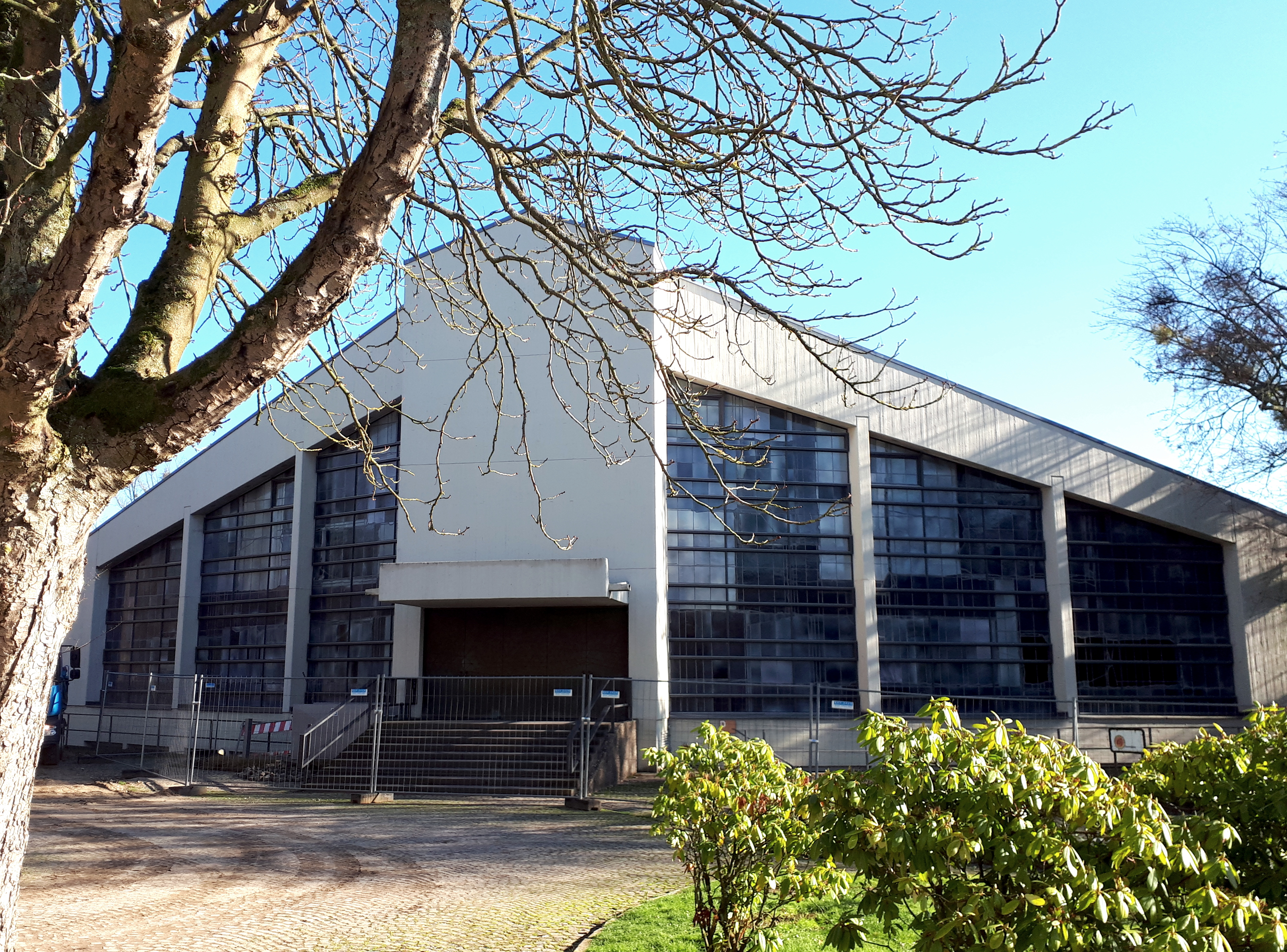 Kapelle des Bischöflichen Pius-Gymnasium in Aachen, Eupener Straße